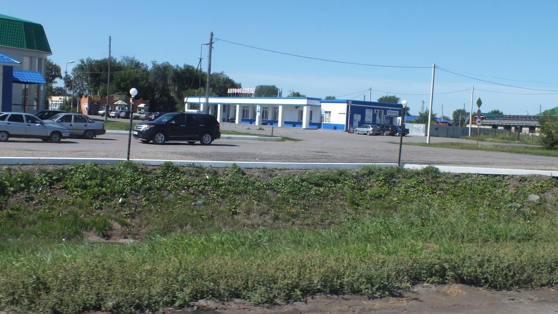 Автовокзал